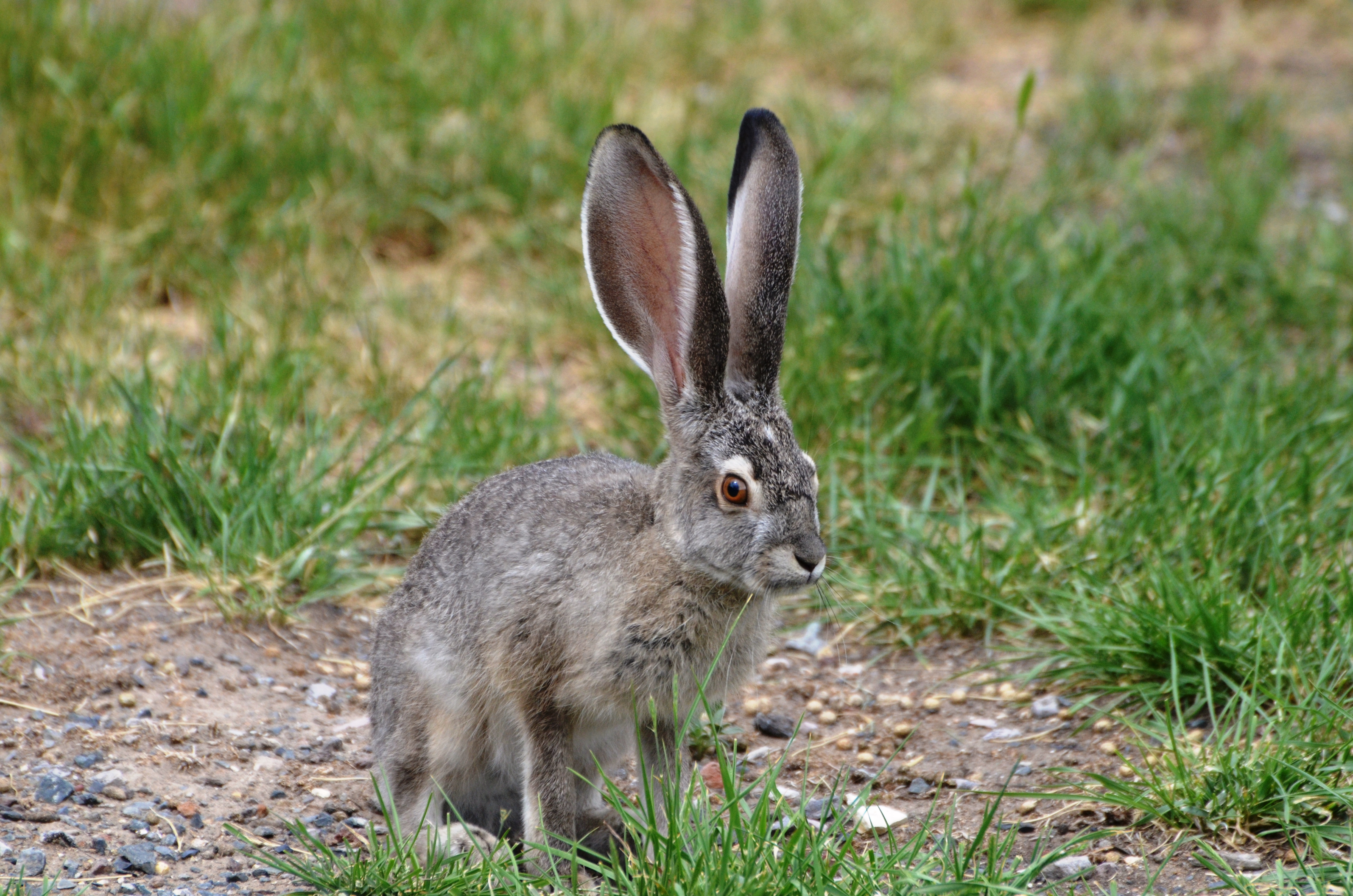 Oregon Trip 2014